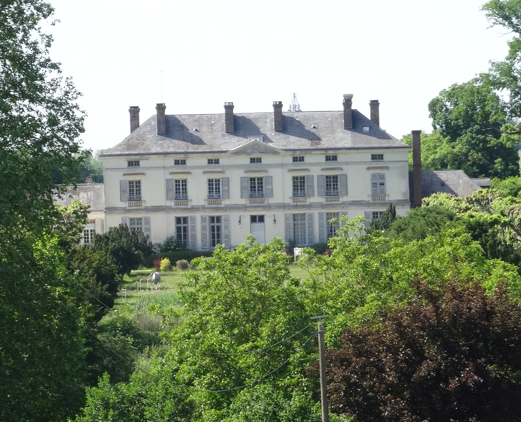 Château du Gué à Tresmes à Congis-sur-Thérouanne. (Seine-et-Marne, région Île-de-France).